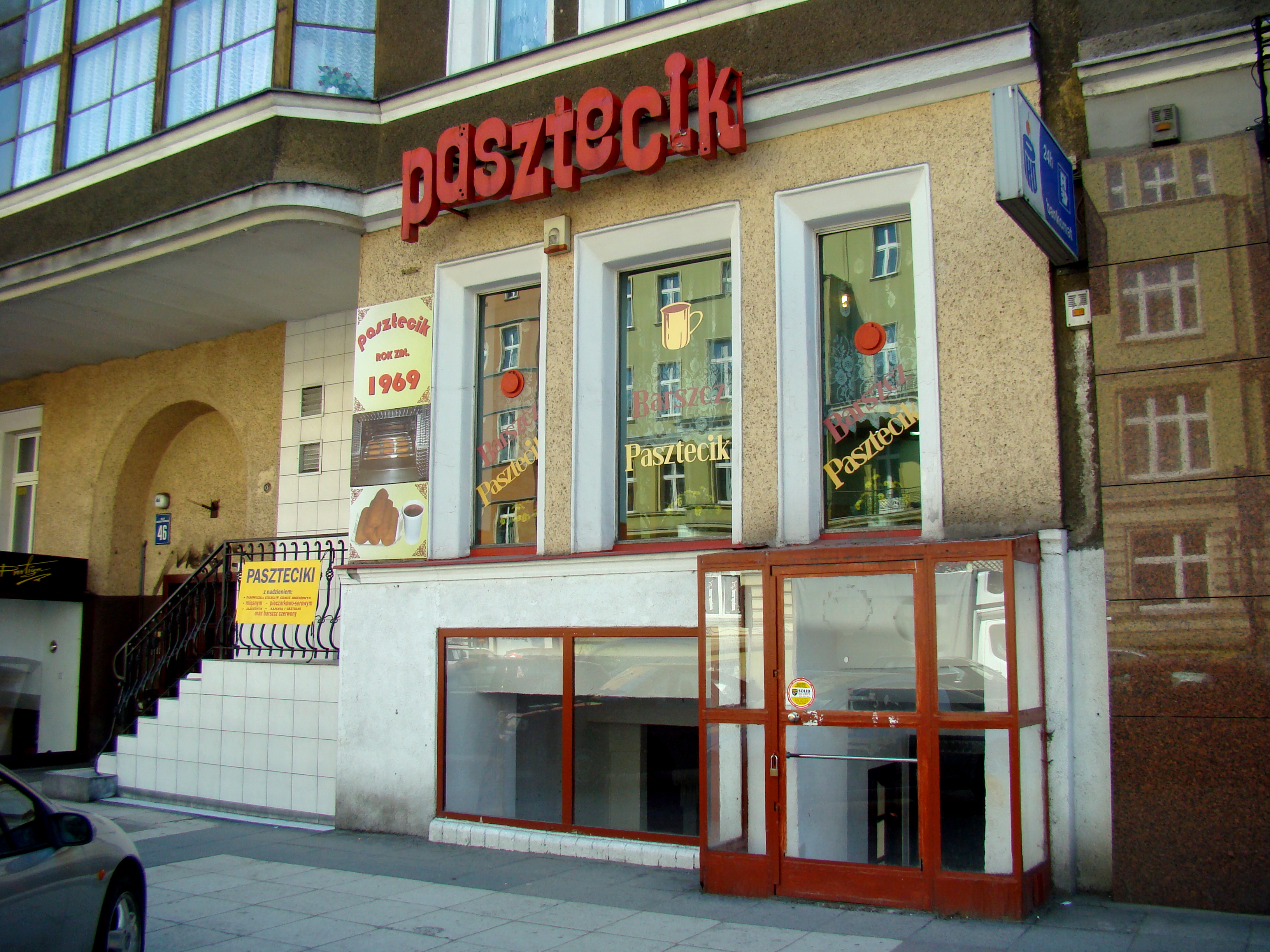 Lokal przy al. Wojska Polskiego w Szczecinie gdzie serwowany jest Pasztecik szczeciński